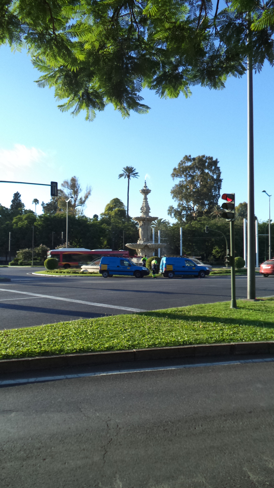 Plaza Don Juan de Austria, en Sevilla